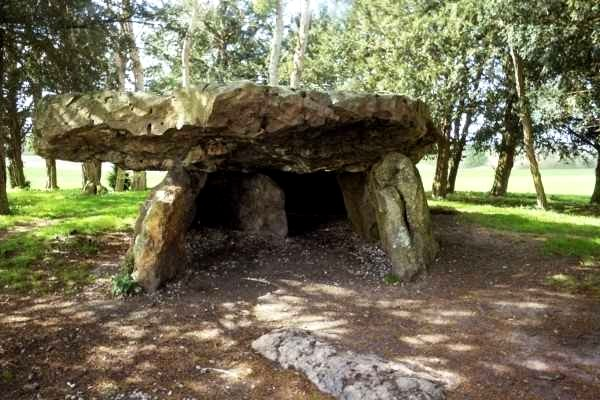 vue de l'entrée du dolmen de Mettray